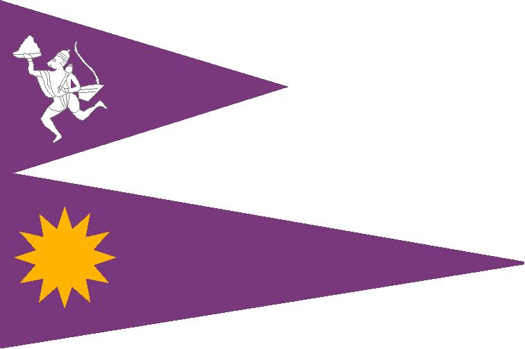 Flagge von Aijaigarh